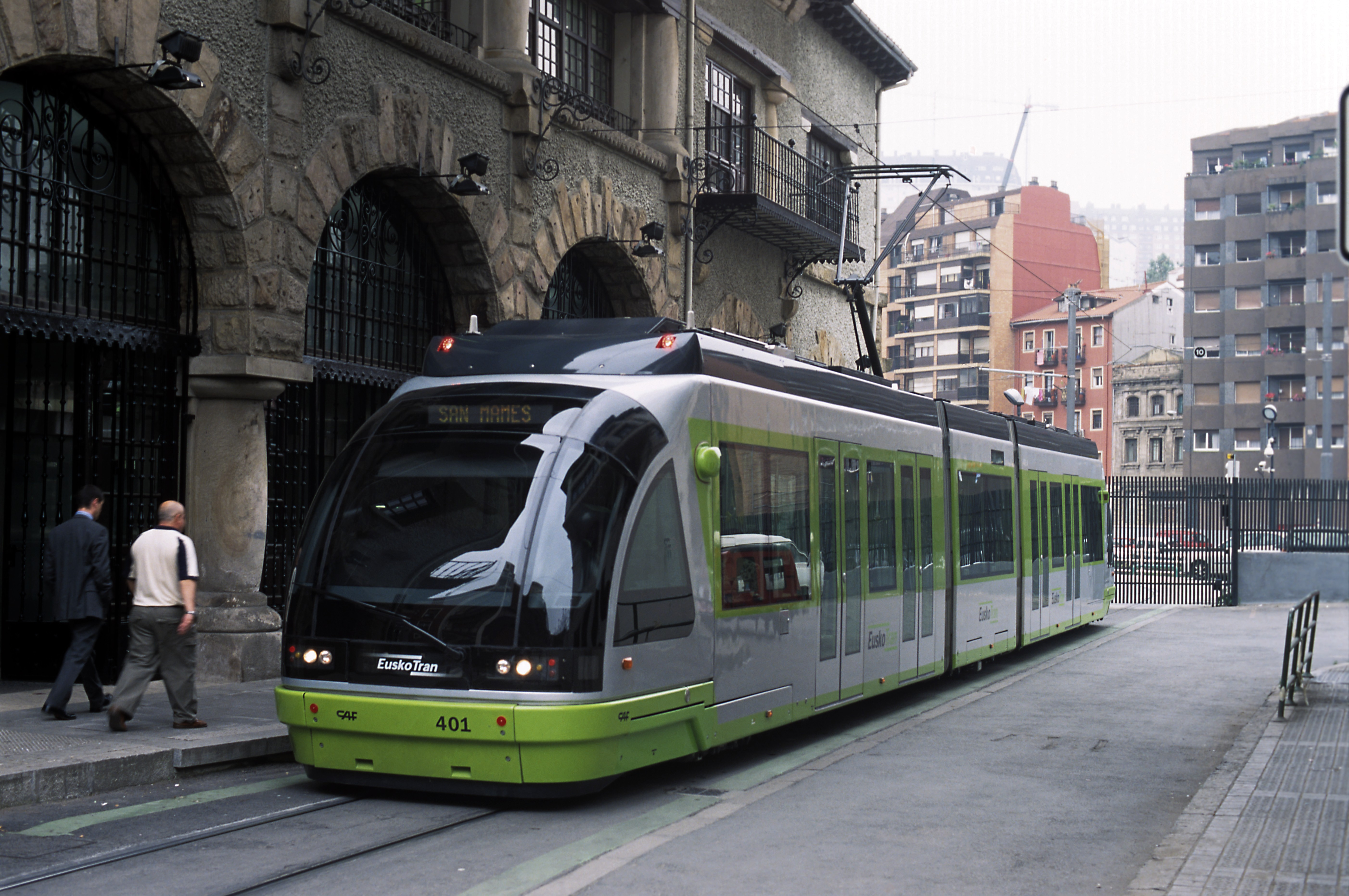 »EuskoTran«-Gelenkzug am Streckenendpunkt Bilbao Atxuri. Links das Empfangsgebäude der Ferrocarriles Vascos